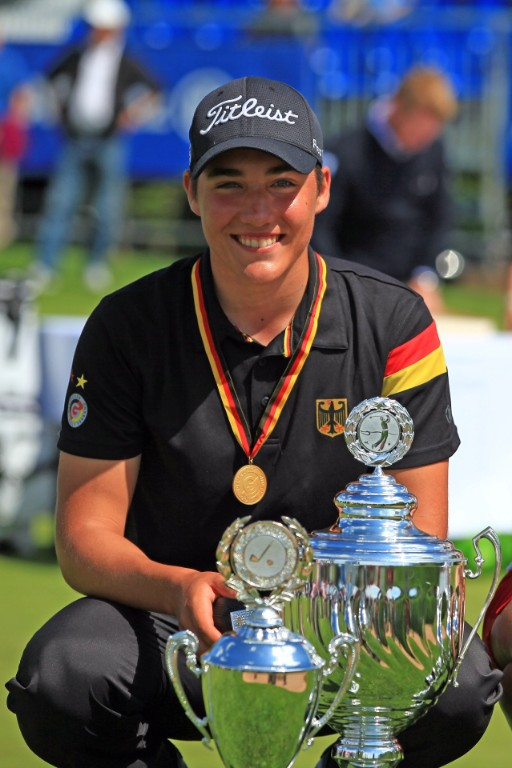 Dominic Foos